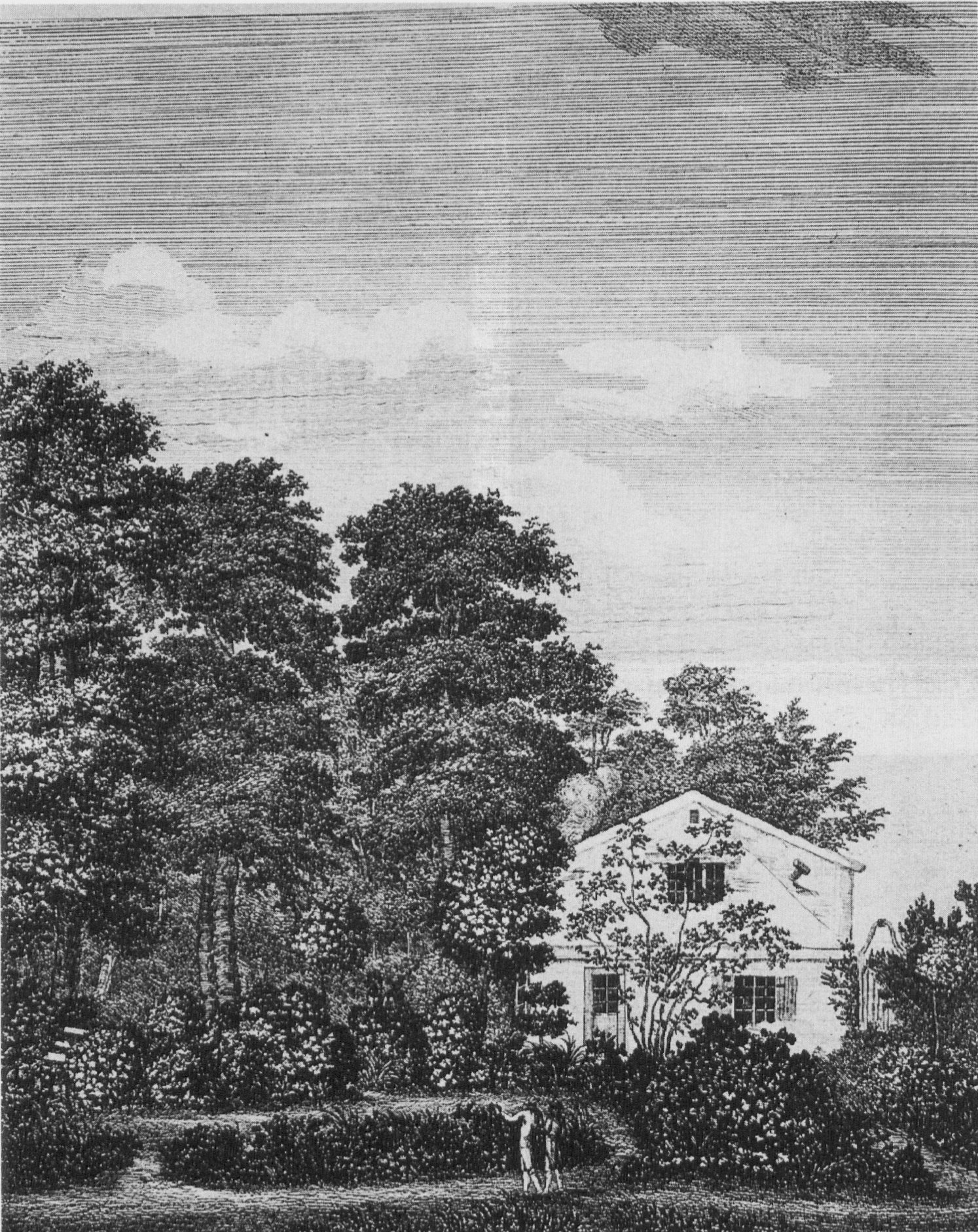 Wohnhaus von Christian Cay Lorenz Hirschfeld bei der "Fruchtbaumschule" in Duesternbrook bei Kiel. Radierung aus der Serie "Holsteins schönste Gegenden, Kopenhagen 1790ff, 24,6 x 19,8 cm